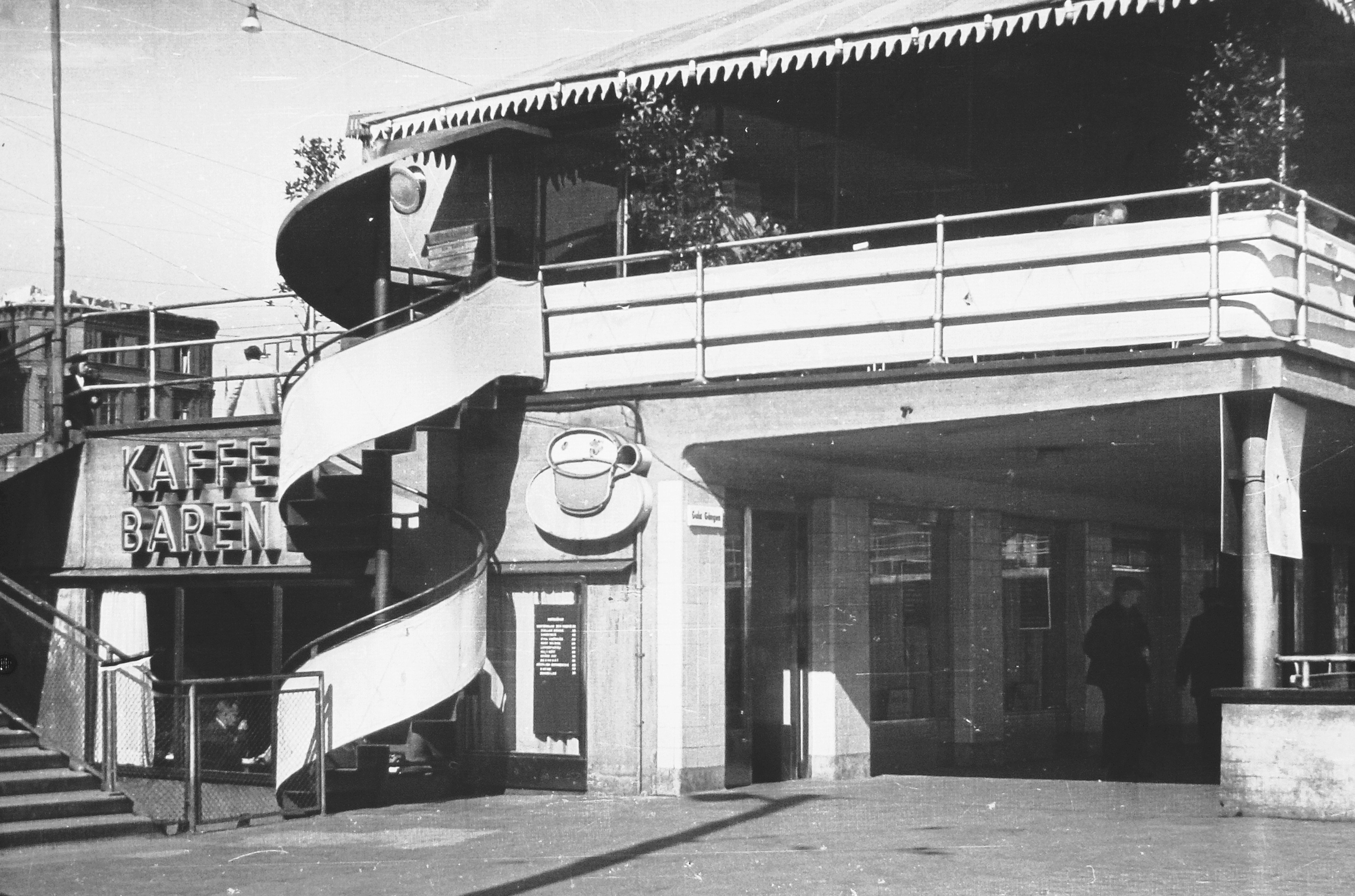 Gula gången med Kaffe Baren (ritad av Holger Blom), Slussen, Stockholm